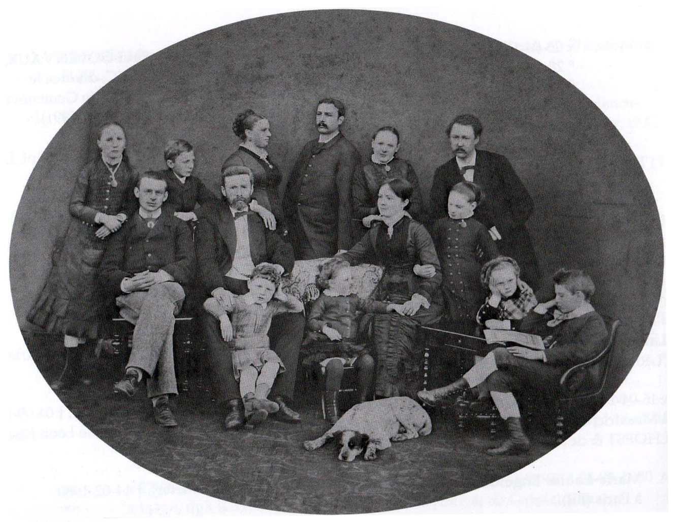 Familieportret van de Maastrichtse ondernemer Eugène Regout en zijn familie. De foto is op zijn laatst in 1881 gemaakt, de sterfdatum van William (links op de stoel); op zijn vroegst in 1879 (de jongste dochter Léonie, midden op de stoel, werd geboren in 1877). Van links naar rechts: 1. Bertha Aldegonde (1868-1890); 2. William Victor (1855-1881); 3. Eugène jr. (1869-1922); 4. Léonie (1837-1906; dochter van Thomas Regout en echtgenote van Eugène sr.); 5 Eugène sr. (1831-1908); 6. Arthur (1875-1950); 7. Paul (1859-1905); 8. Jeanne (1866-1953); 9. Mathilde (1857-1928); 10. Léonie (1877-1953); 11. Joseph Starren, 1e echtgenoot van Mathilde (1852-1888); Marie (1870-1926); 13. Laura (1874-1965); 14. Henri (1872-1955).